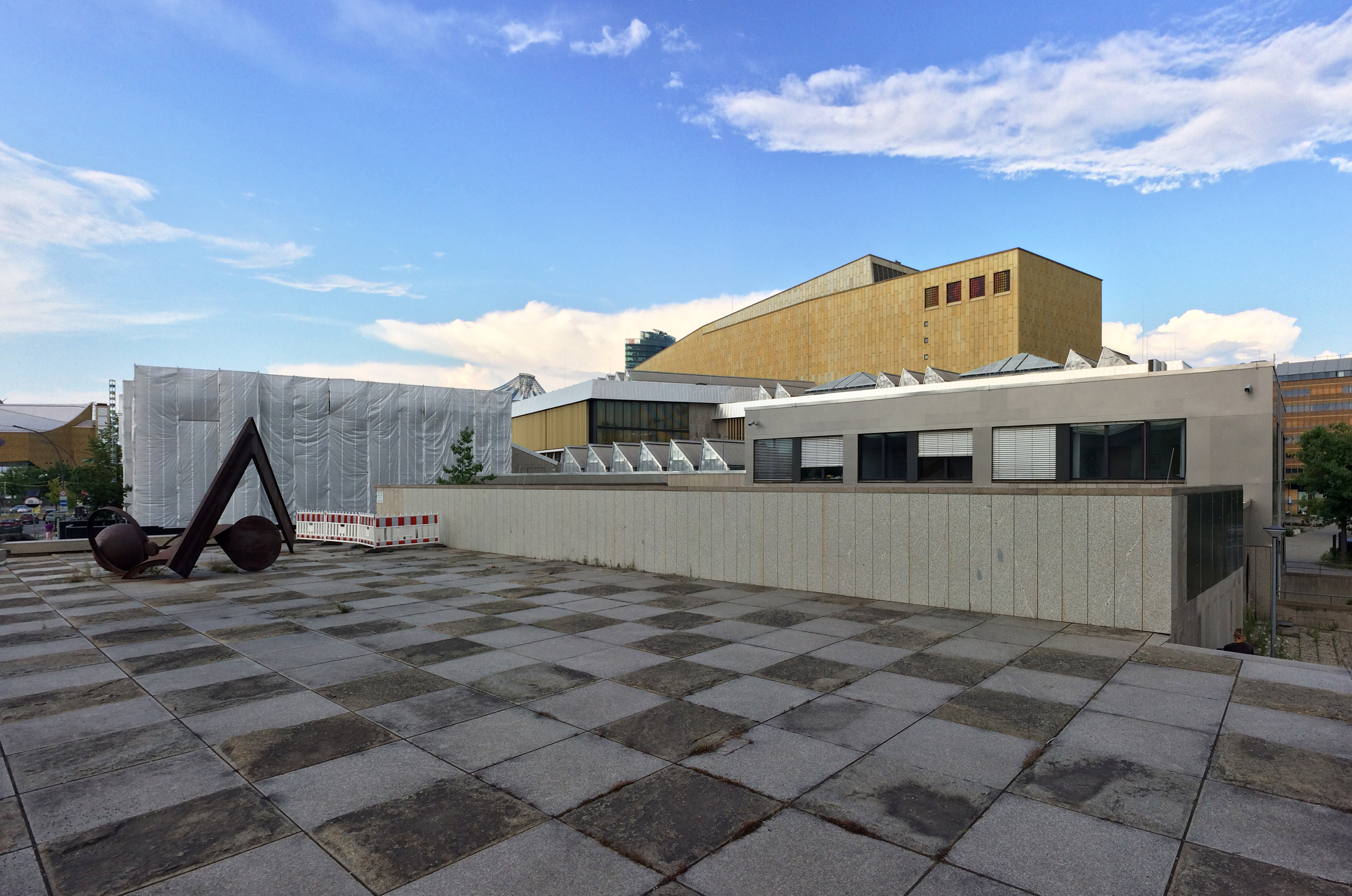 Staatsbibliothek Haus Potsdamer Straße, Ibero-Amerikanisches Institut, Otto-Braun-Saal, Kulturforum, Berlin-Tiergarten, 1967–1978, Hans Scharoun & Edgar Wisniewski; Stahlplastik "Constellation", 1991, Bernhard Heiliger